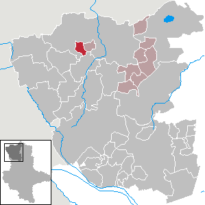 Lage von Wieblitz-Eversdorf im Altmarkkreis Salzwedel